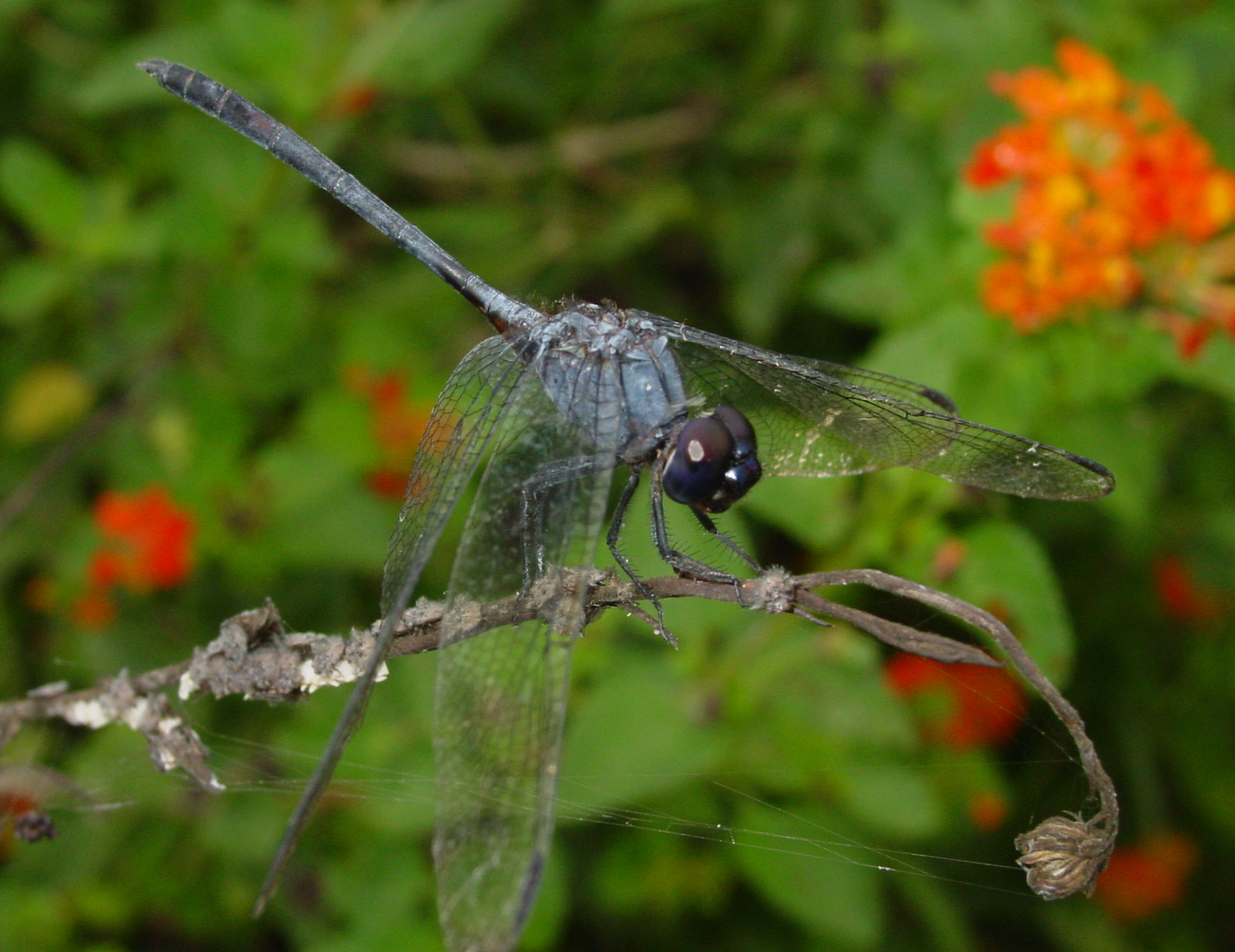 Dythemis nigrescens, Black Setwing 1, Bentsen-Rio SP, 9-7-07.